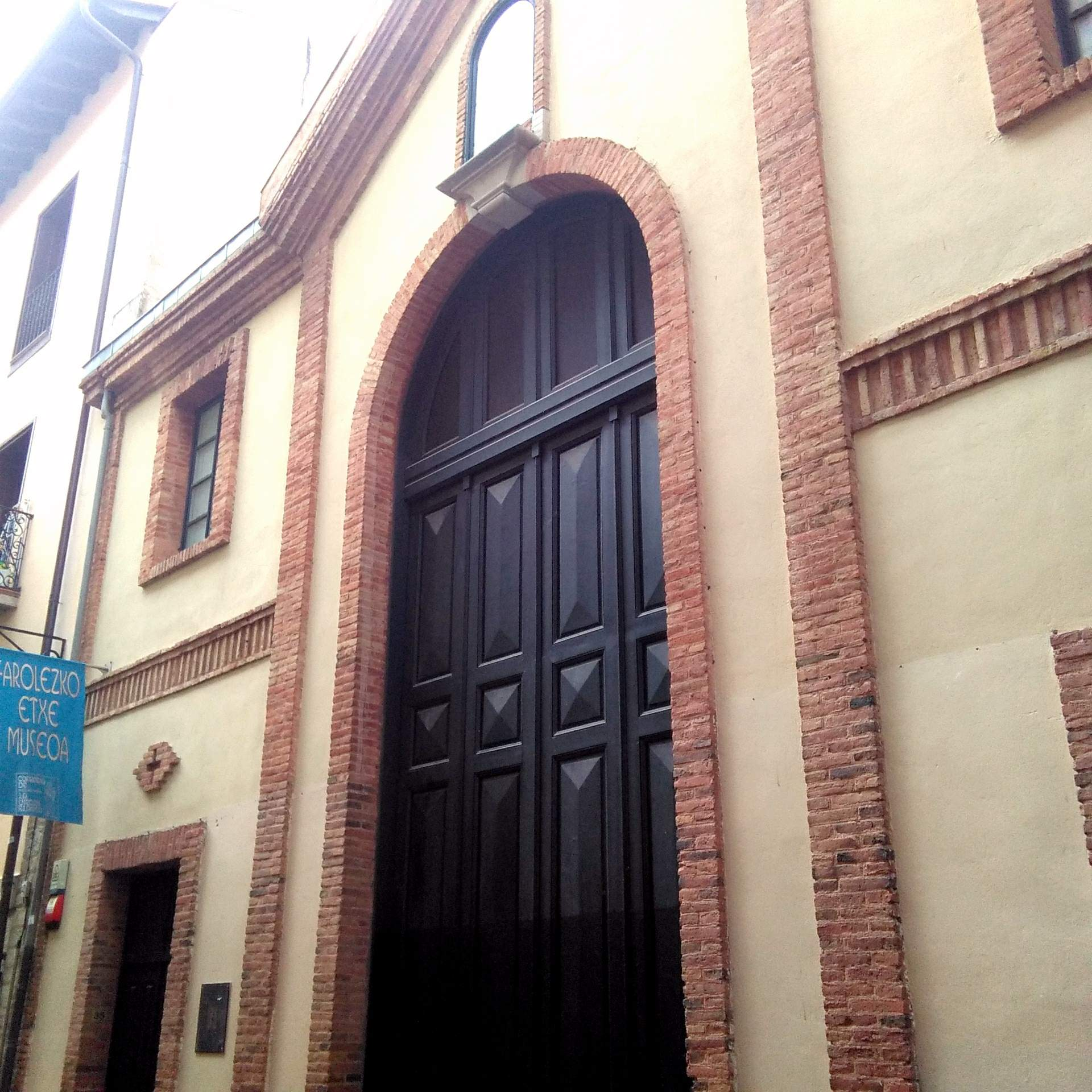 Museo de los Faroles (Vitoria)